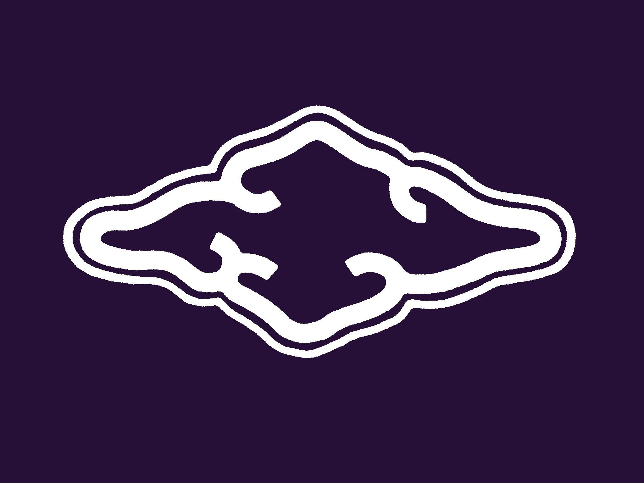 校旗の写真があれば差し替えた方が良いかと思います。